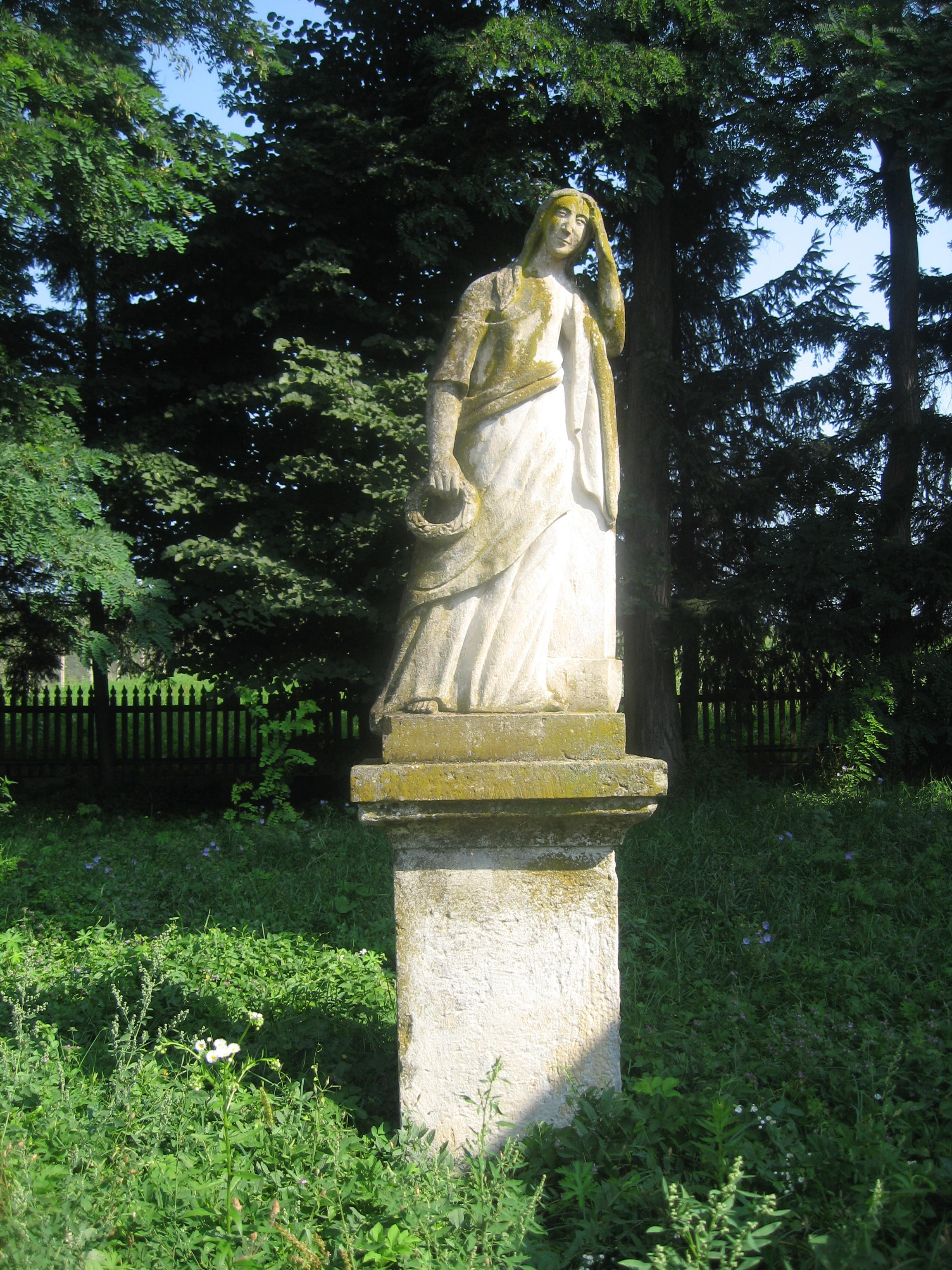 Statuia Moldova plânge din Rotopănești, județul Suceava, România.